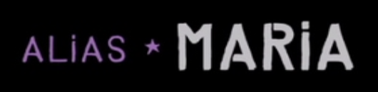 Logo para la película Alias María